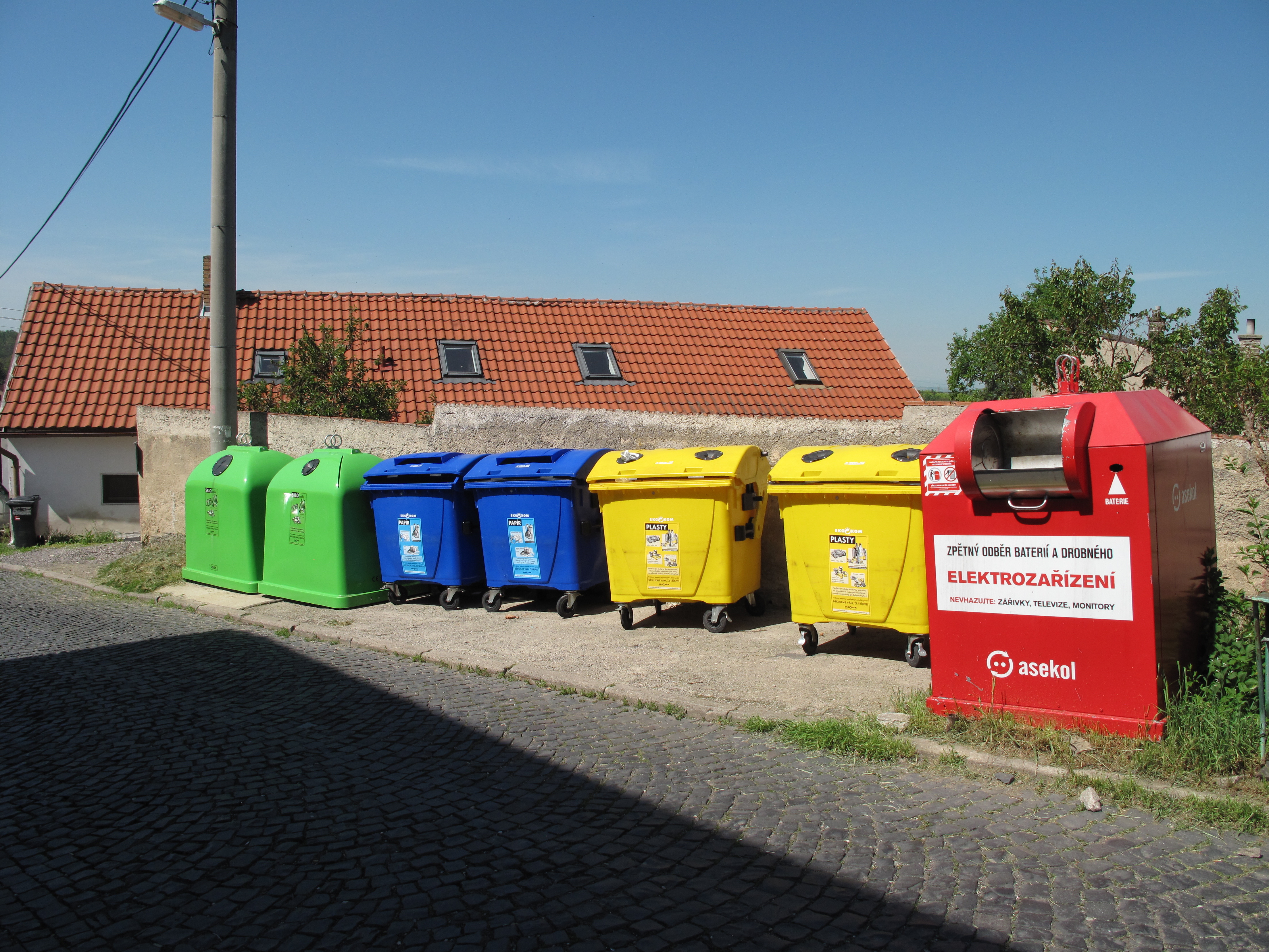 Buštěhrad. Okres Kladno, Česká republika. Vodárenská, kontejnery na tříděný odpad.